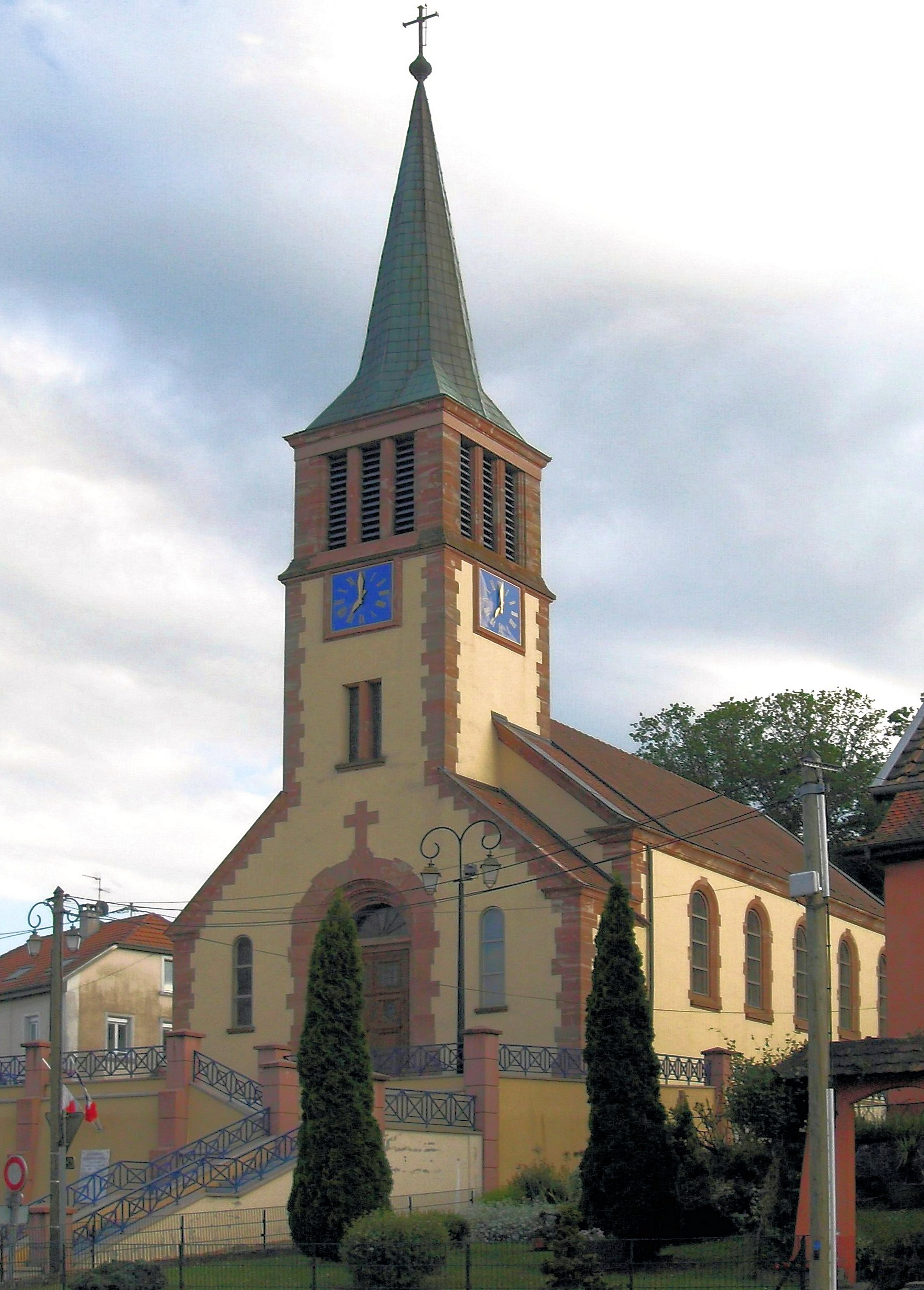 L'église Saint-Hubert à Seppois-le-Haut